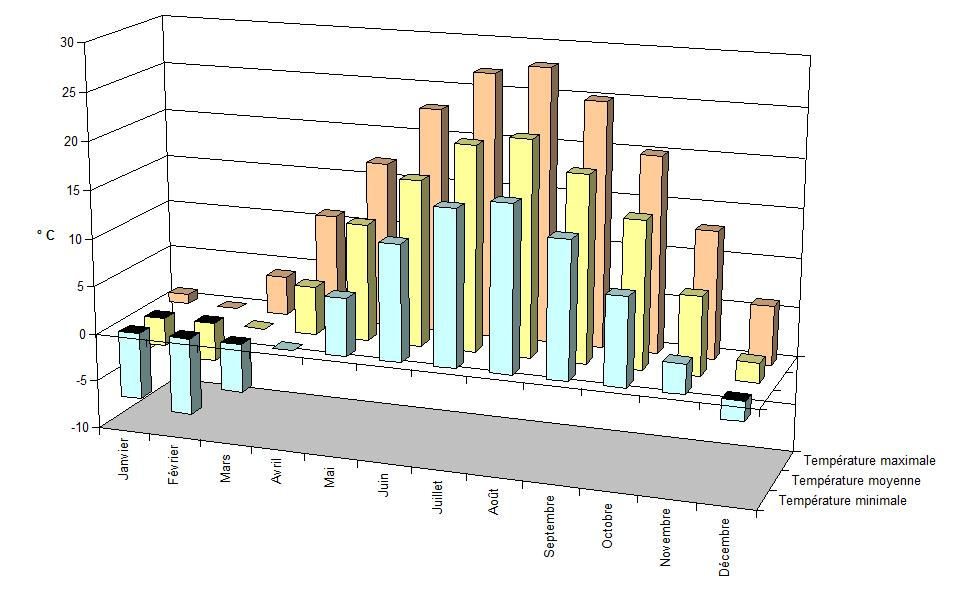 Températures moyennes mensuelles à Hartford (Michigan, Etats-Unis)